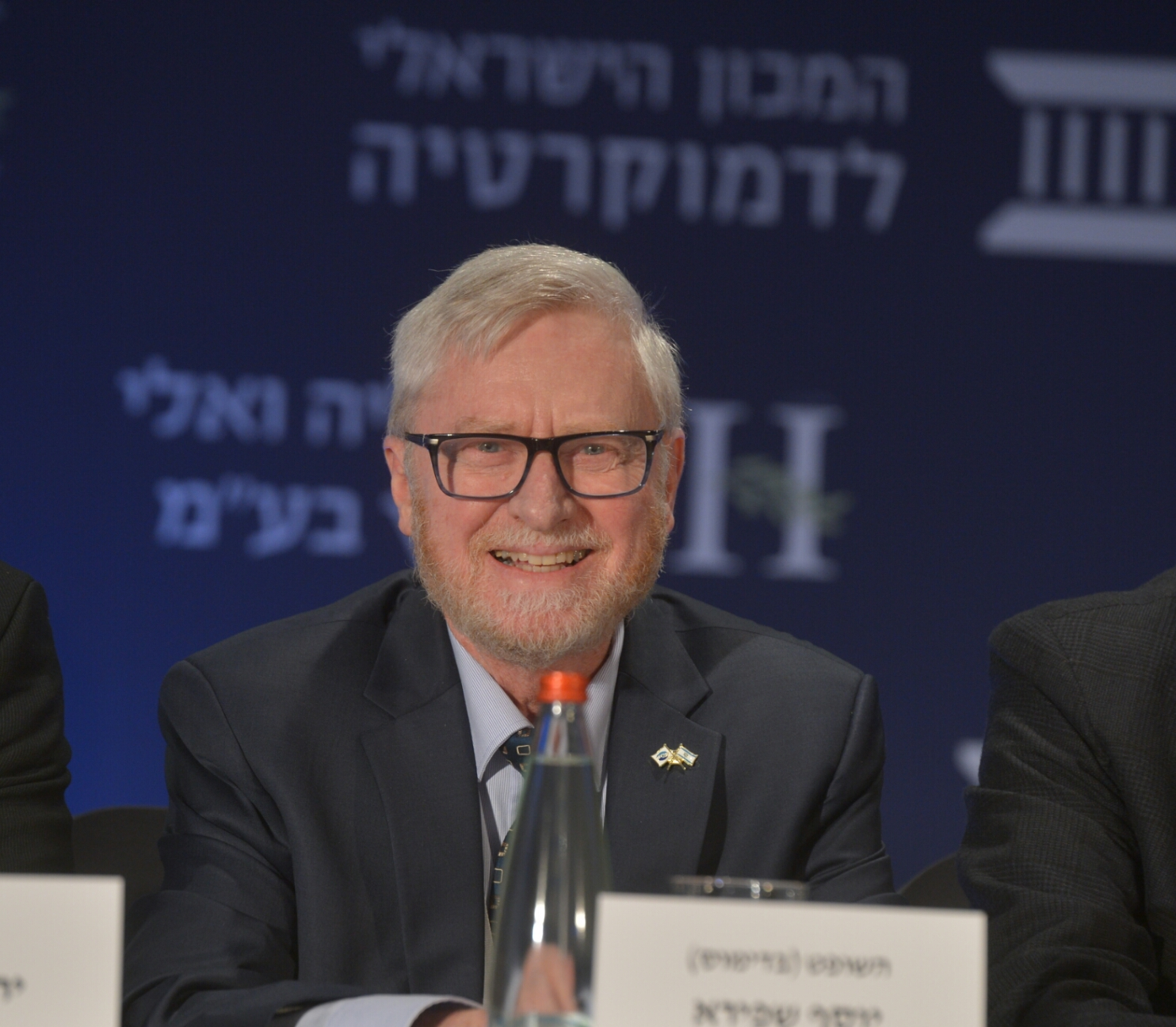 השופט בדימוס יוסף שפירא, מבקר המדינה